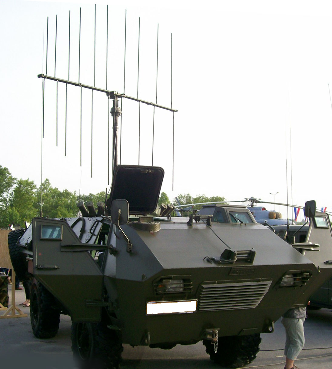 LOV-T1 Ometač: lako oklopno vozilo za elektoničku borbu